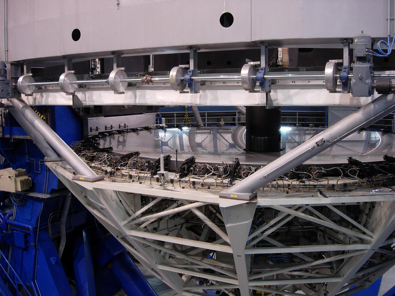 Dieses Bild stammt von einem Besuch beim VLT und wurde selbst fotografiert. Es zeigt den Hauptspiegel eines der vier großen Teleskope.